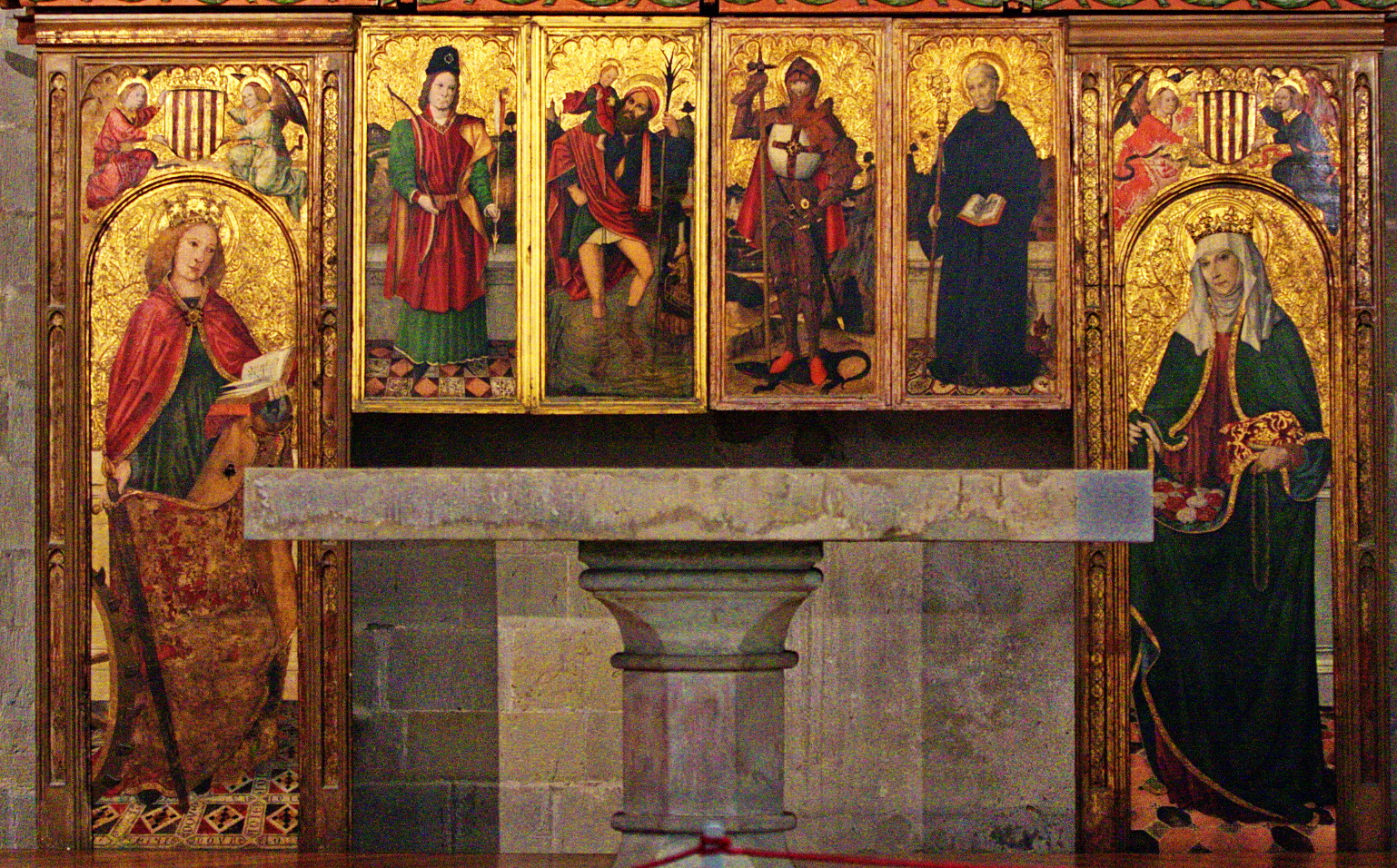 Capella Reial de Santa Àgata (Barcelona). Retaule del Conestable, obra de Jaume Huguet (1464-1465). Tremp sobre taula (673 x 368 cm)